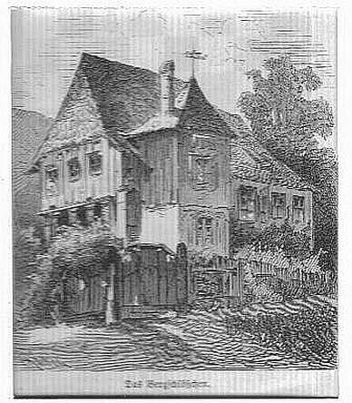 "Das Bergschlößchen", von Herbert König, Holzstich 1871